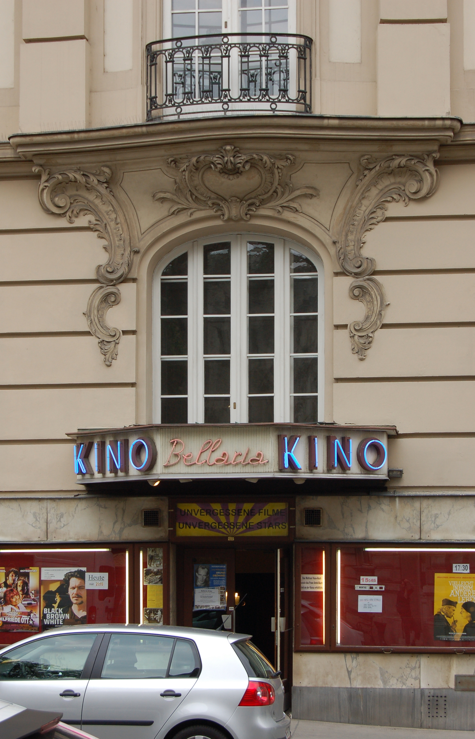 Das denkmalgeschützte Bürgerhaus/Bellaria-Kino in der Museumstraße 3 in Wien-Neubau.